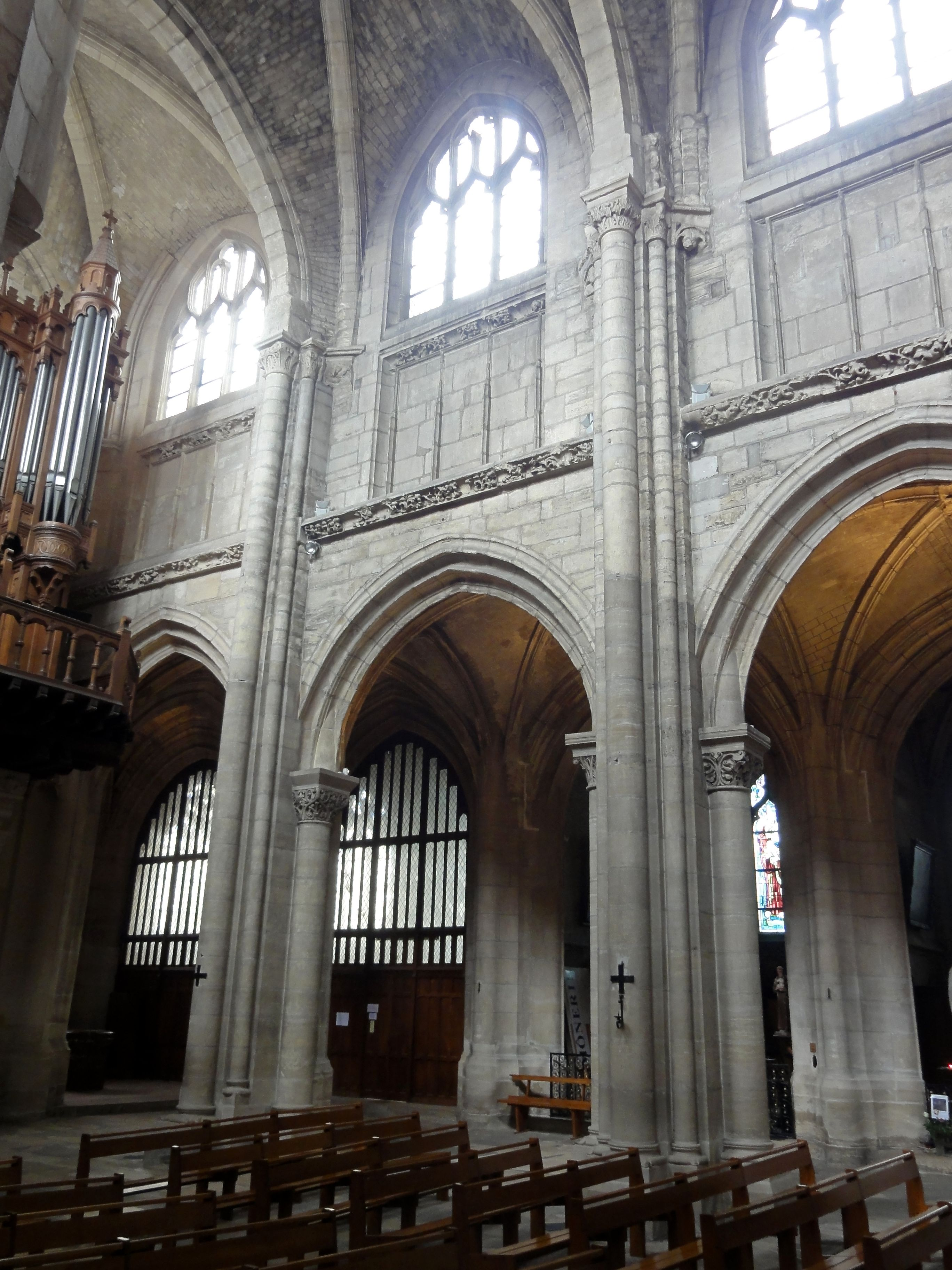 Nef, première et seconde travée, côté nord.